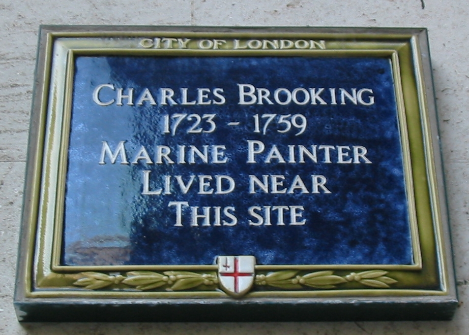 Nrf: Pliaque à Londres